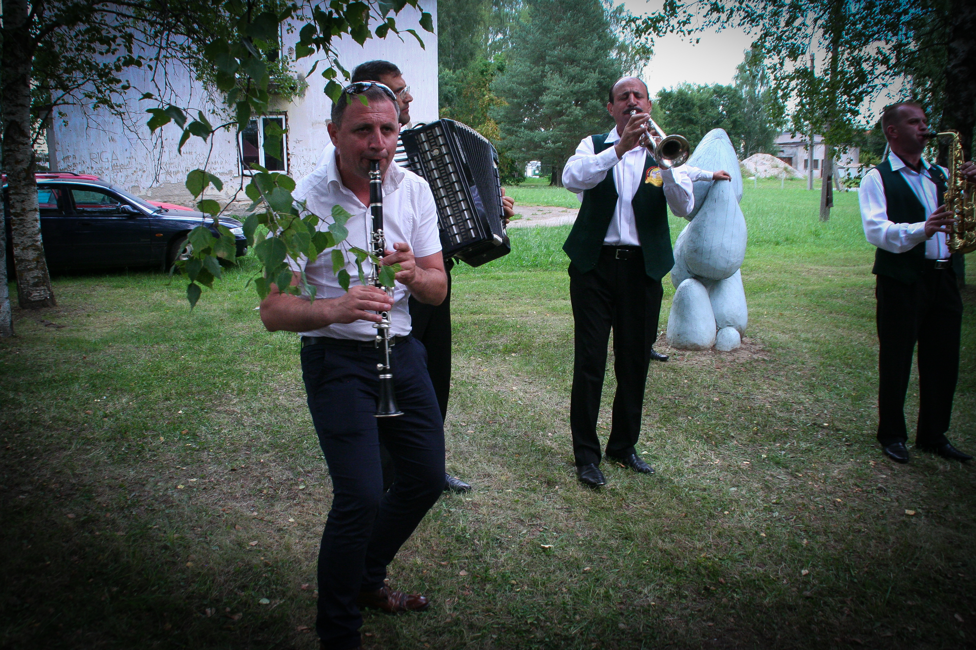 Spordi- ja muusikapäev Kadrinas 2014